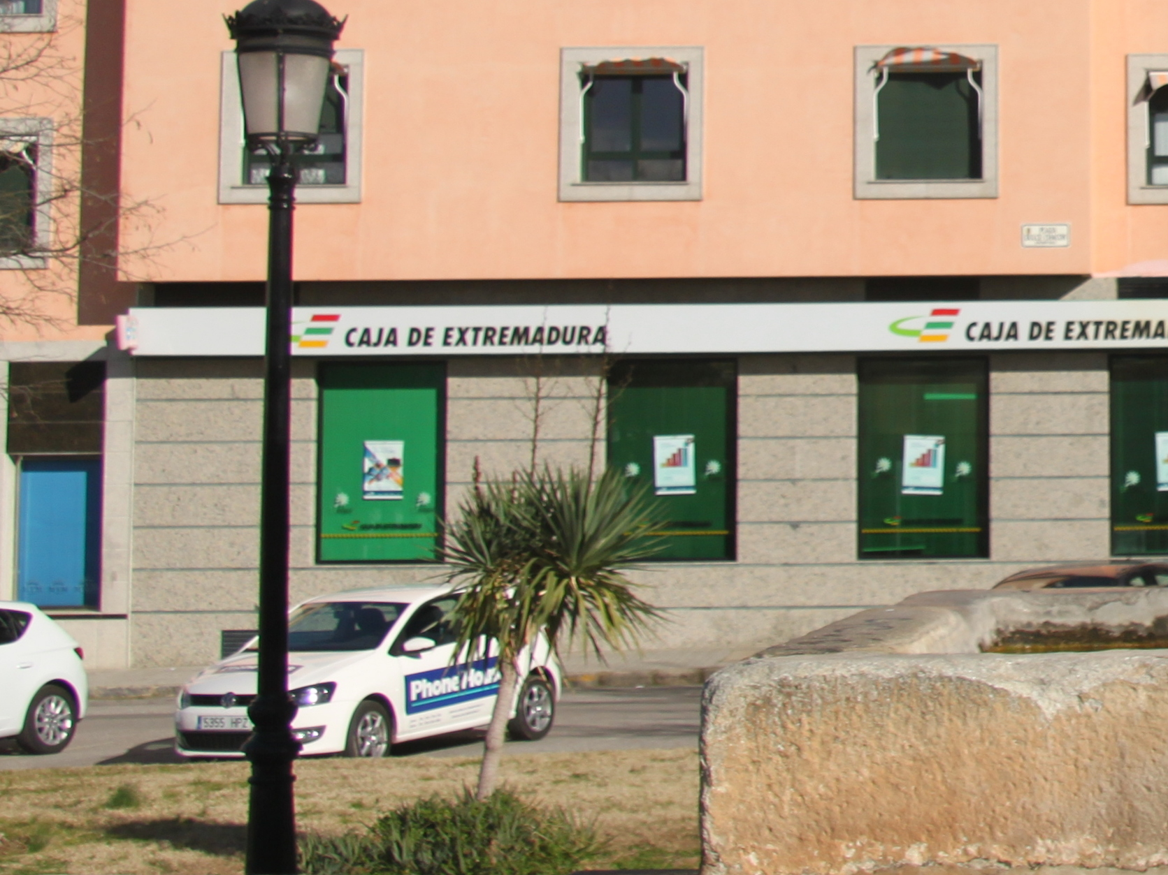 Zafra - fountain